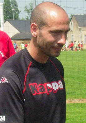 Yannick Fischer